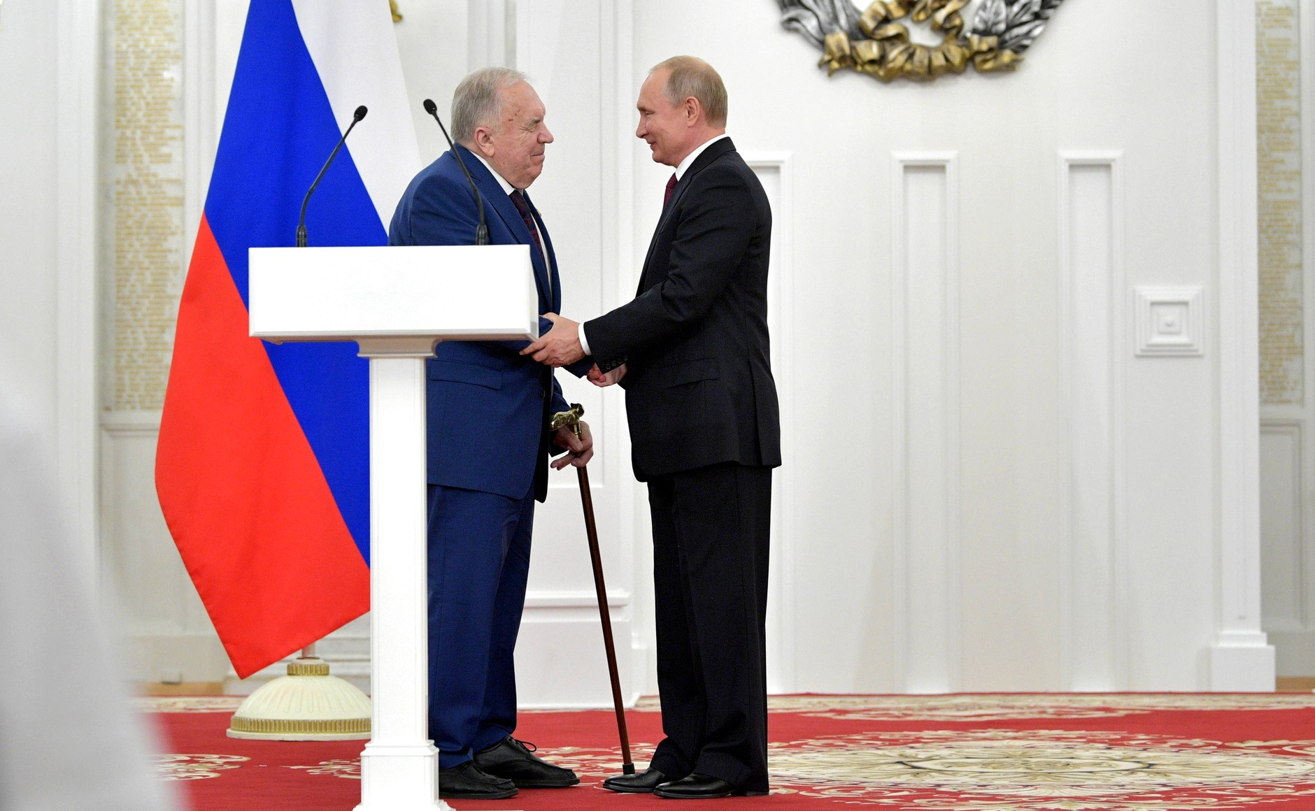 Вручение государственных премий Российской Федерации. C доктором медицинских наук, академиком РАН Владимиром Харченко.